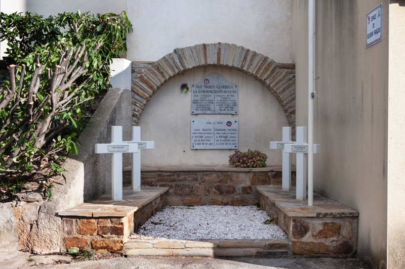 Monument aux morts - Archives départementales de l’Hérault - FRAD034-2458W-Usclas-du-Bosc-00001